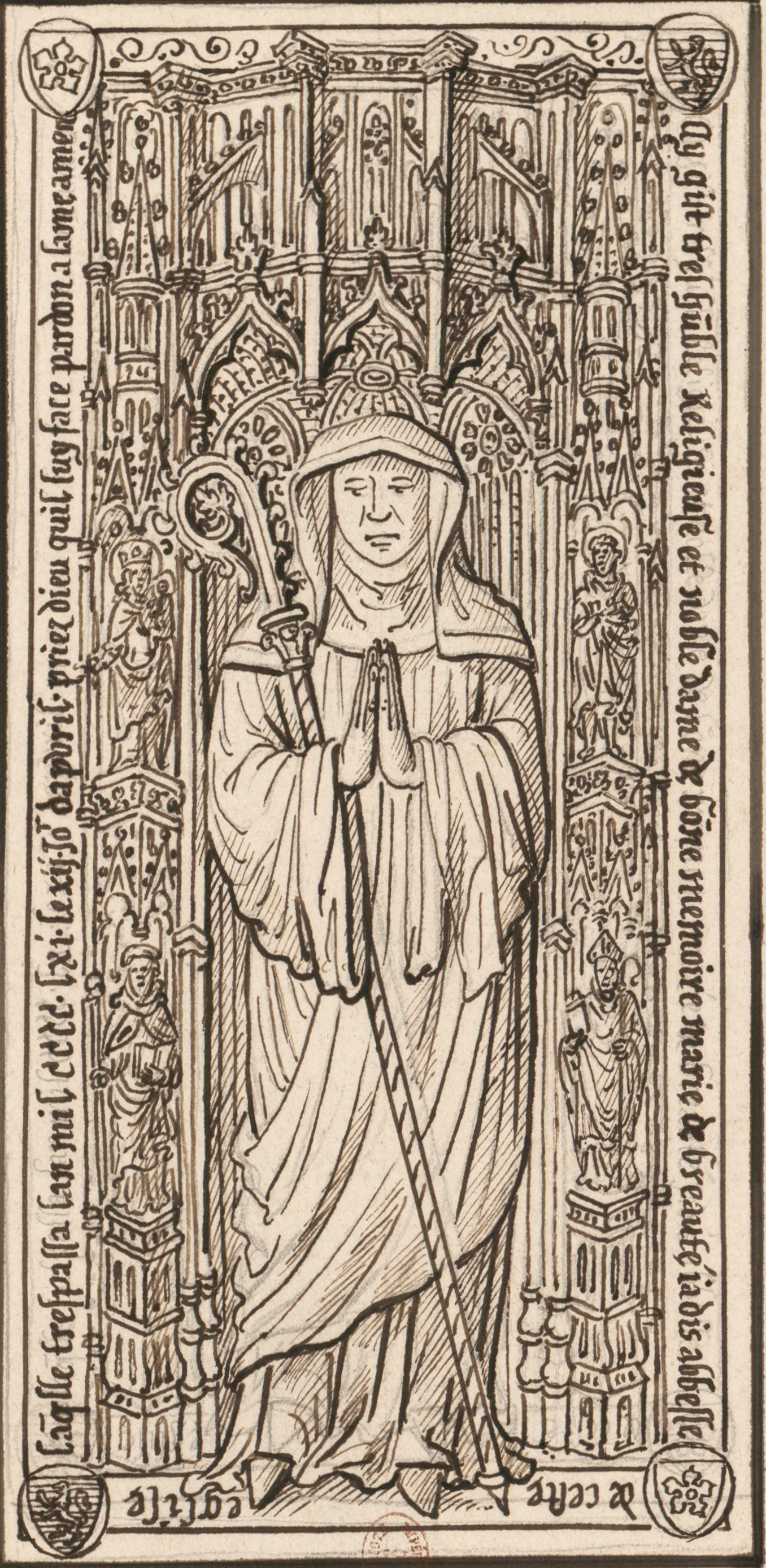 Pierre tombale sur laquelle est gravée l'effigie d'une religieuse